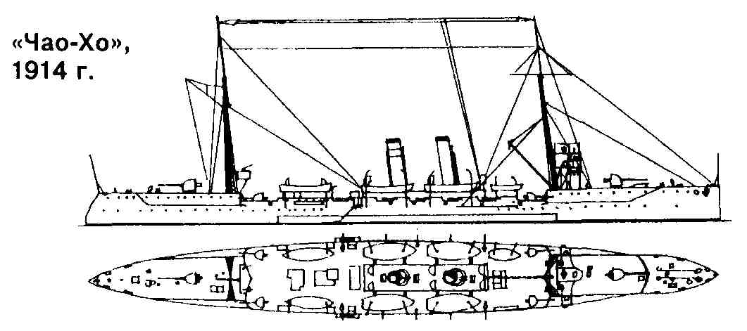 Схема крейсера "Чао-Хо"